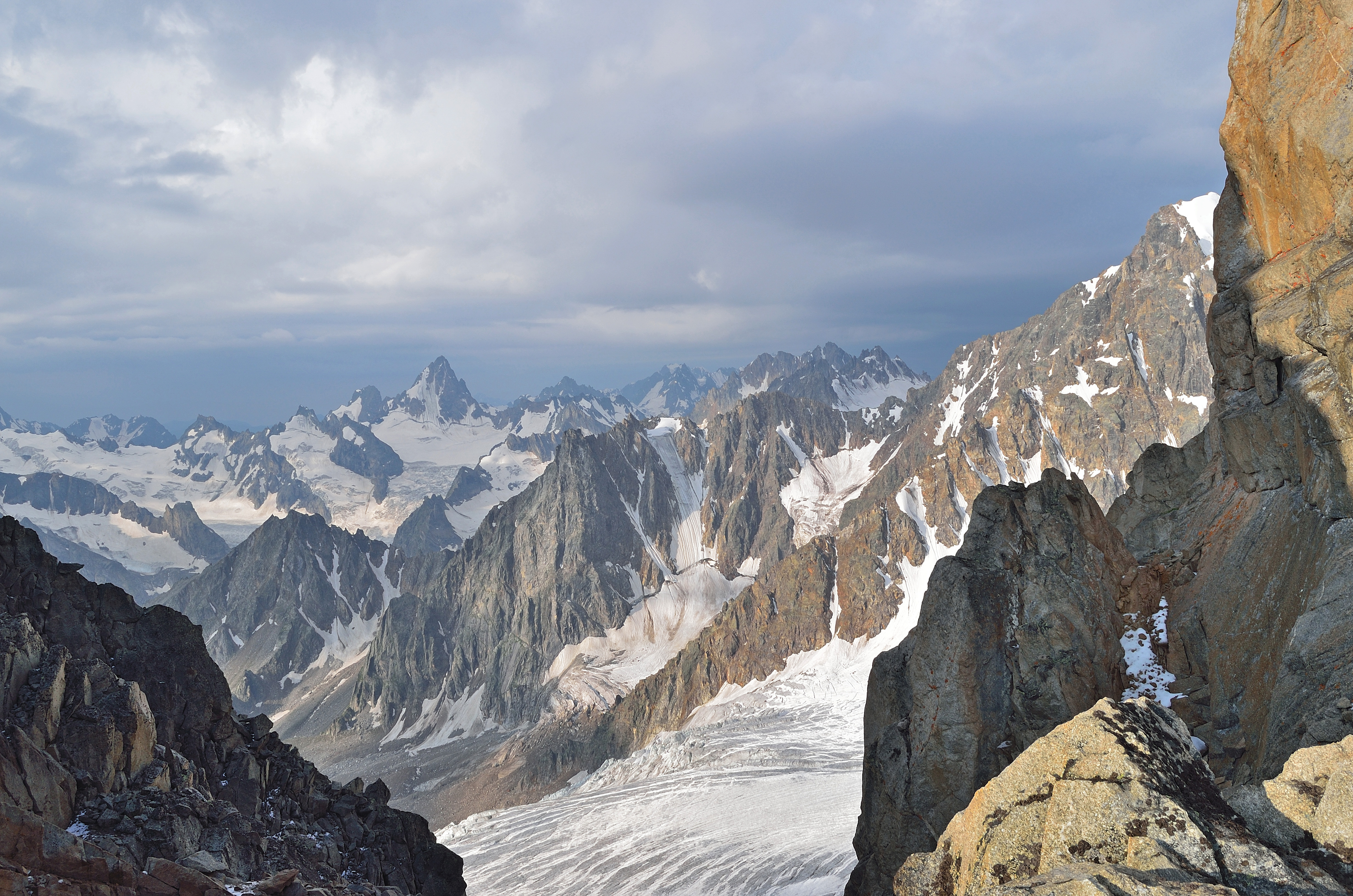 Кабардино-Балкарский государственный высокогорный заповедник: Заповедник располагается на территории Черекского (бывш. Советского) и Чегемского р-нов КБР, по Главному Кавказскому и Боковому хребтам в верховьях рек Черека Балкарского, Черека Бизенгийского и Чегема This image is related to the protected area of Russia number 0700034